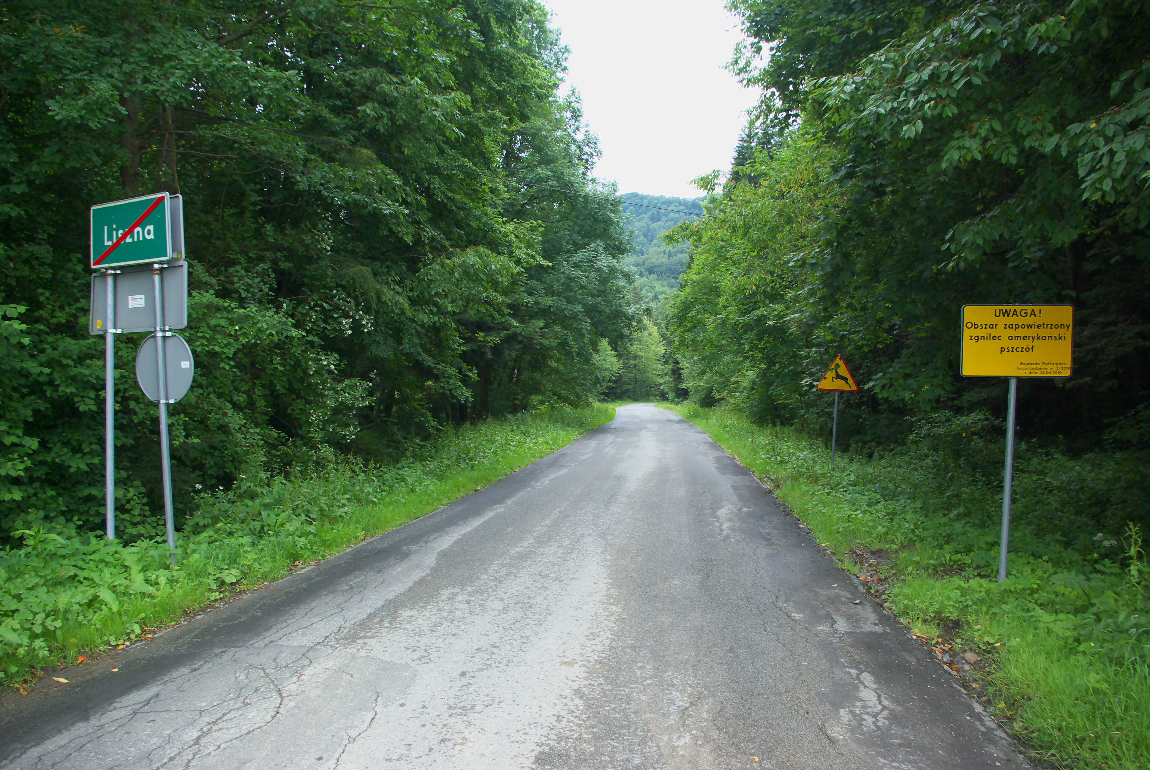 Liszna. Obszar zapowietrzony zgnilec amerykański pszczół (2020).